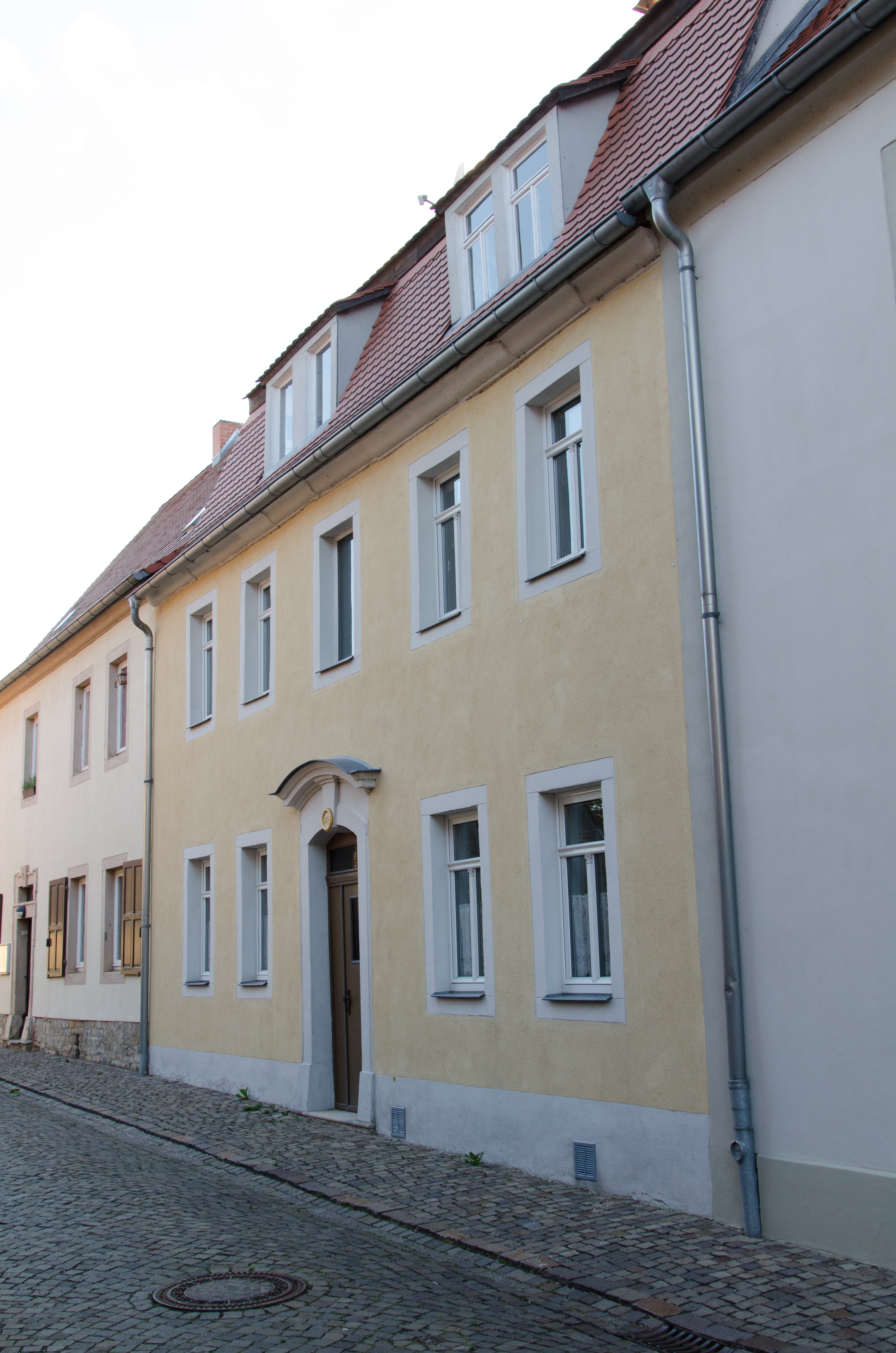 Querfurt, Burgstraße 8